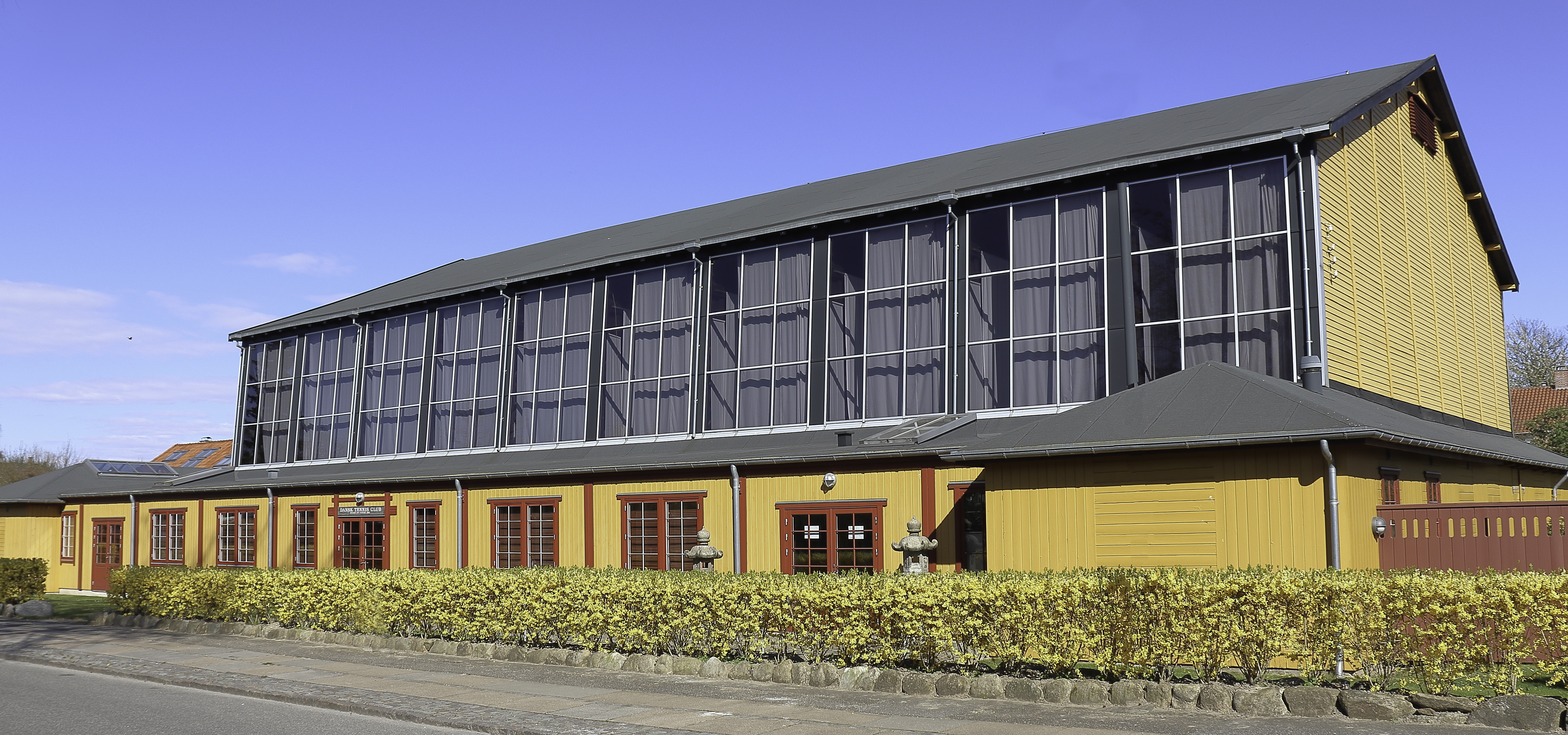 Dansk Tennis Club (også kendt som "Rovsing-Hallen") opført i 1919 på Rygaards Allé 75 i Hellerup.